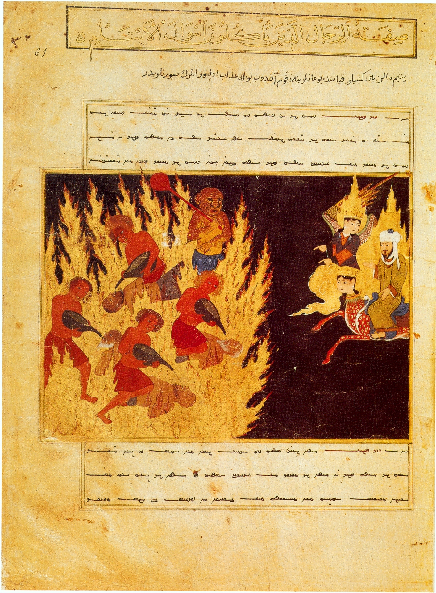 Mira'jnama Мираджнаме 1436 Париж, Нац.библ..